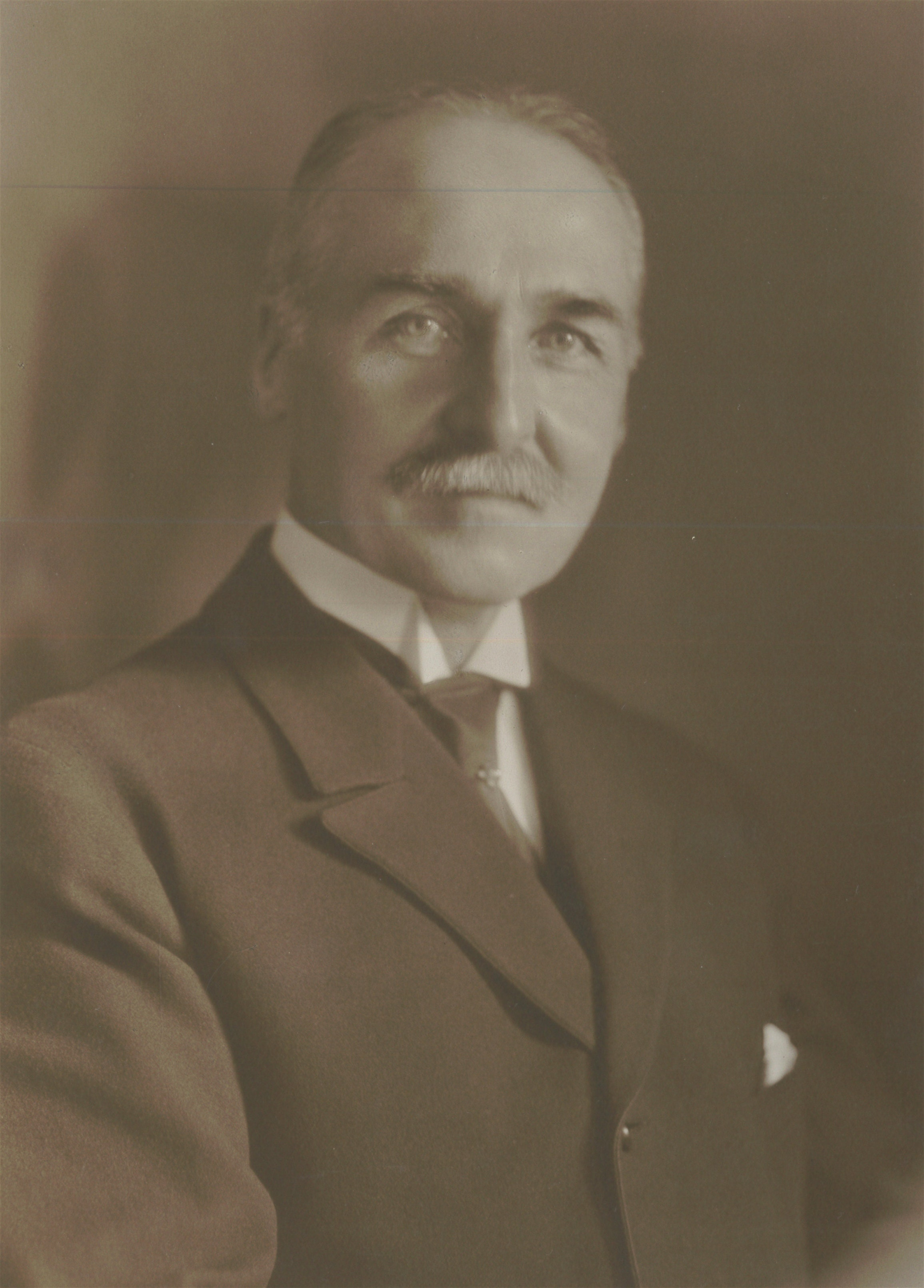 Portrait de Guillaume Fatio.